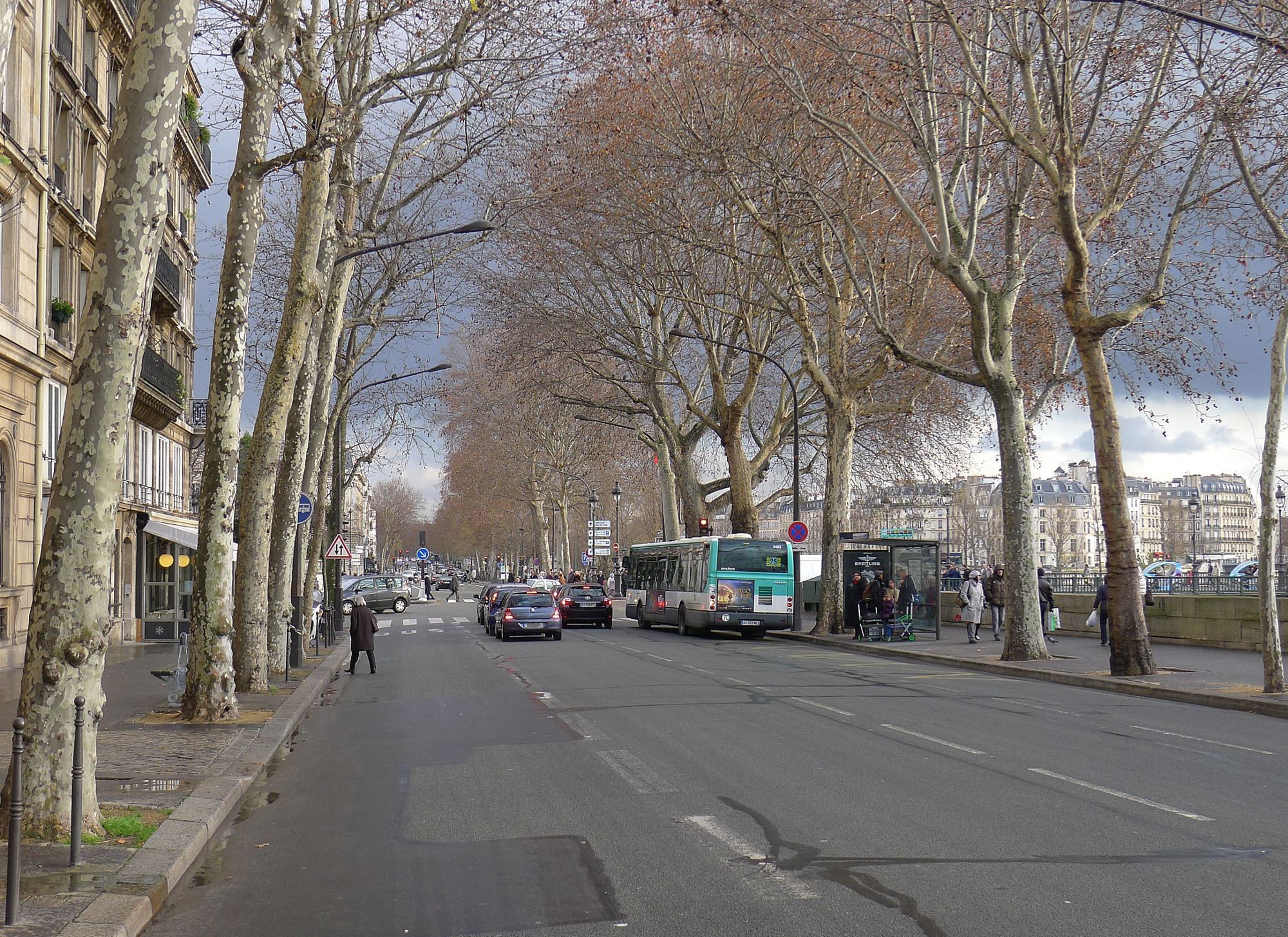 Quai de Gesvres - Paris IV